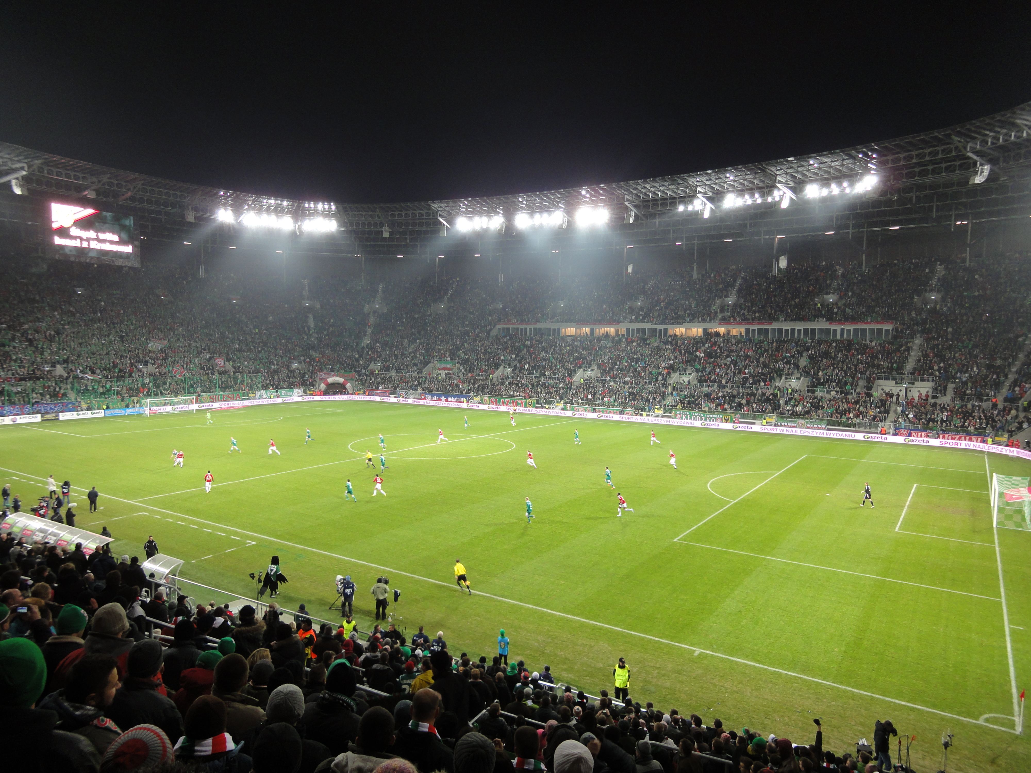 Mecz WKS Śląska z Wisłą Kraków na Stadionie Miejskim we Wrocławiu.